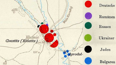 Landkarte mit ethnischen Gruppen in Klöstitz nach der rumänischen Volkszählung von 1930, hier 2700 Deutsche, 50 Juden, 50 Rumänen, 50 Russen